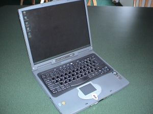 An Acer laptop computer.